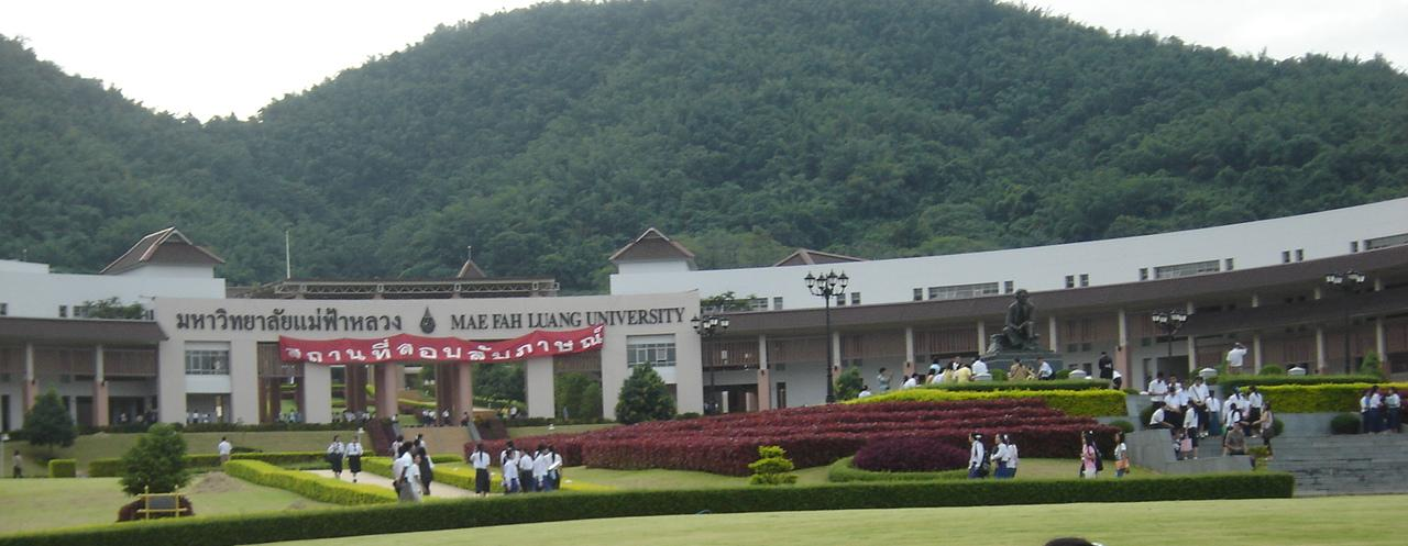 Mae Fah Luang university, Chiangrai, Thailand